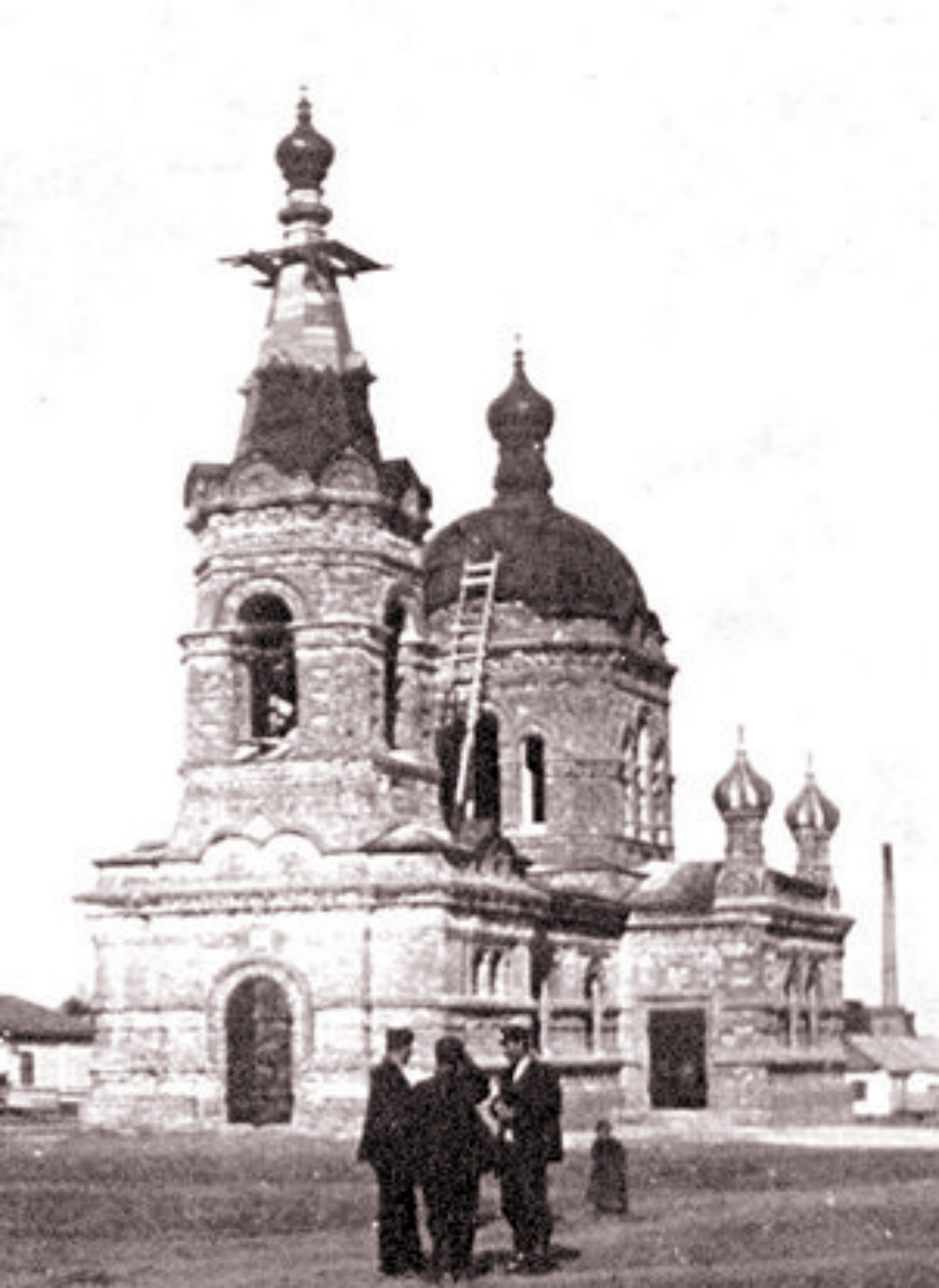 Храм Иоанна Предтечи, Таганрог, 1903